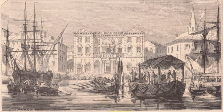 Arrivée du cercueil de Jean François Mayor de Montricher à Marseille